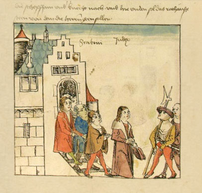 Blick auf das "alte" Rathaus, am "Burgerplatz", 1544 durch den heutigen Neubau am Marktplatz ersetzt. Volkacher Salbuch folio 388v unten